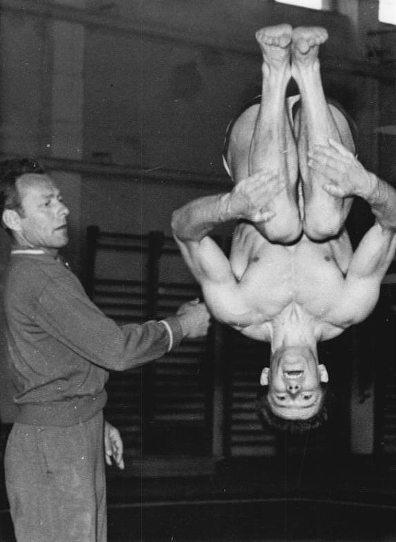 Siegfried Fülle Zentralbild Kohls Tre-Qu. 25.6.1962 Turnweltmeisterschaften 1962. Vom 3. bis 8.7.1962 finden in Prag die Turnweltmeisterschaften 1962 statt. Das DDR-Aufgebot der Männer umfasst 8 Turner. UBz: Siegfried Fülle (SC DHfK Leipzig) ist für die Turnweltmeisterschaften gut gerüstet. Hier beobachtet DDR-Trainer Lätzer (links) während des vorbereitenden Trainings die Übungen seines Schützlings.